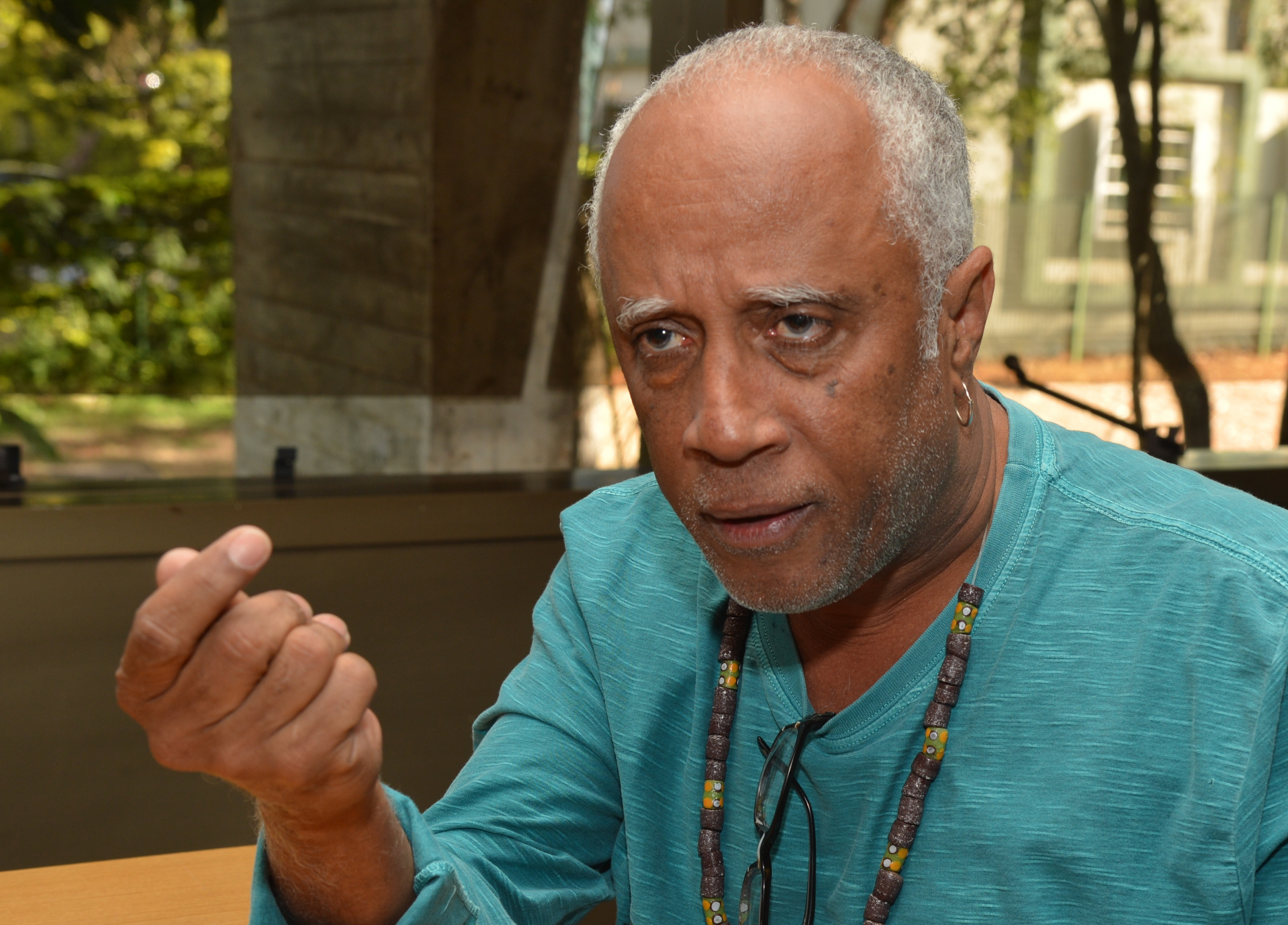 O presidente da Fundação Cultural Palmares, Hilton Cobra. Debate Memórias e Trajetórias das Políticas Públicas para a Cultura Negra faz homenagem aos 25 anos da Fundação Palmares. Na foto, o presidente da Fundação Cultural Palmares, Hilton Cobra.